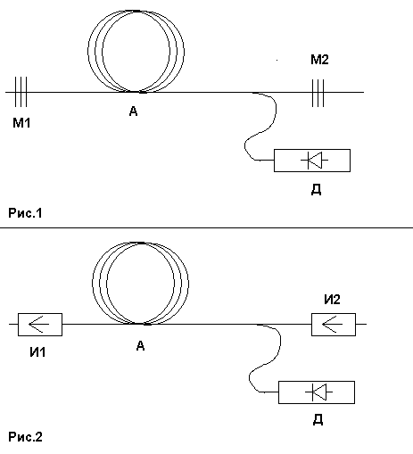 Простейшие оптические схемы волоконно-оптических лазера и усилителя